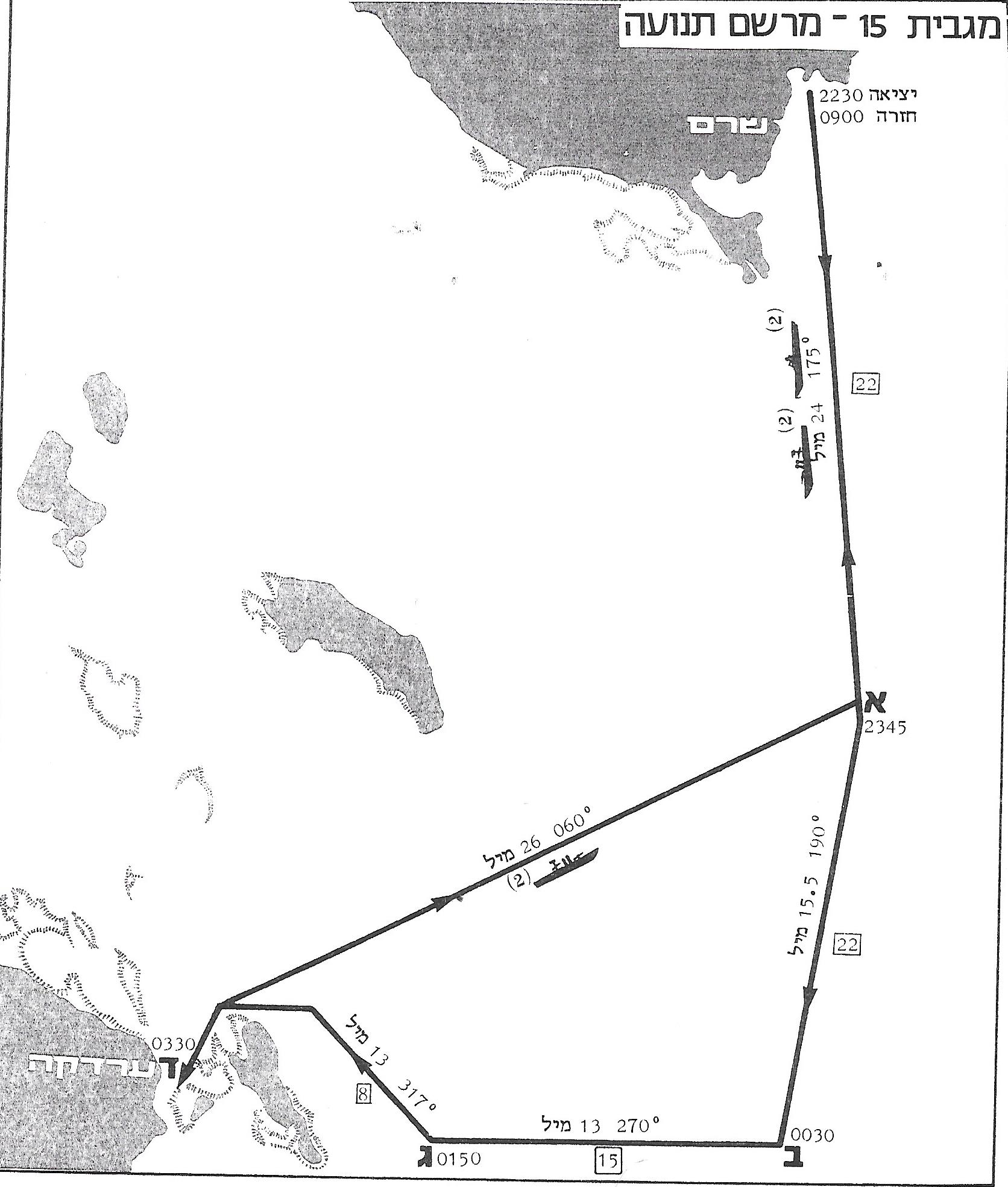 תרשים תנועת כוח הסנוניות וסירות הנפץ לנמל ערדקה וחזרה מגבית 15